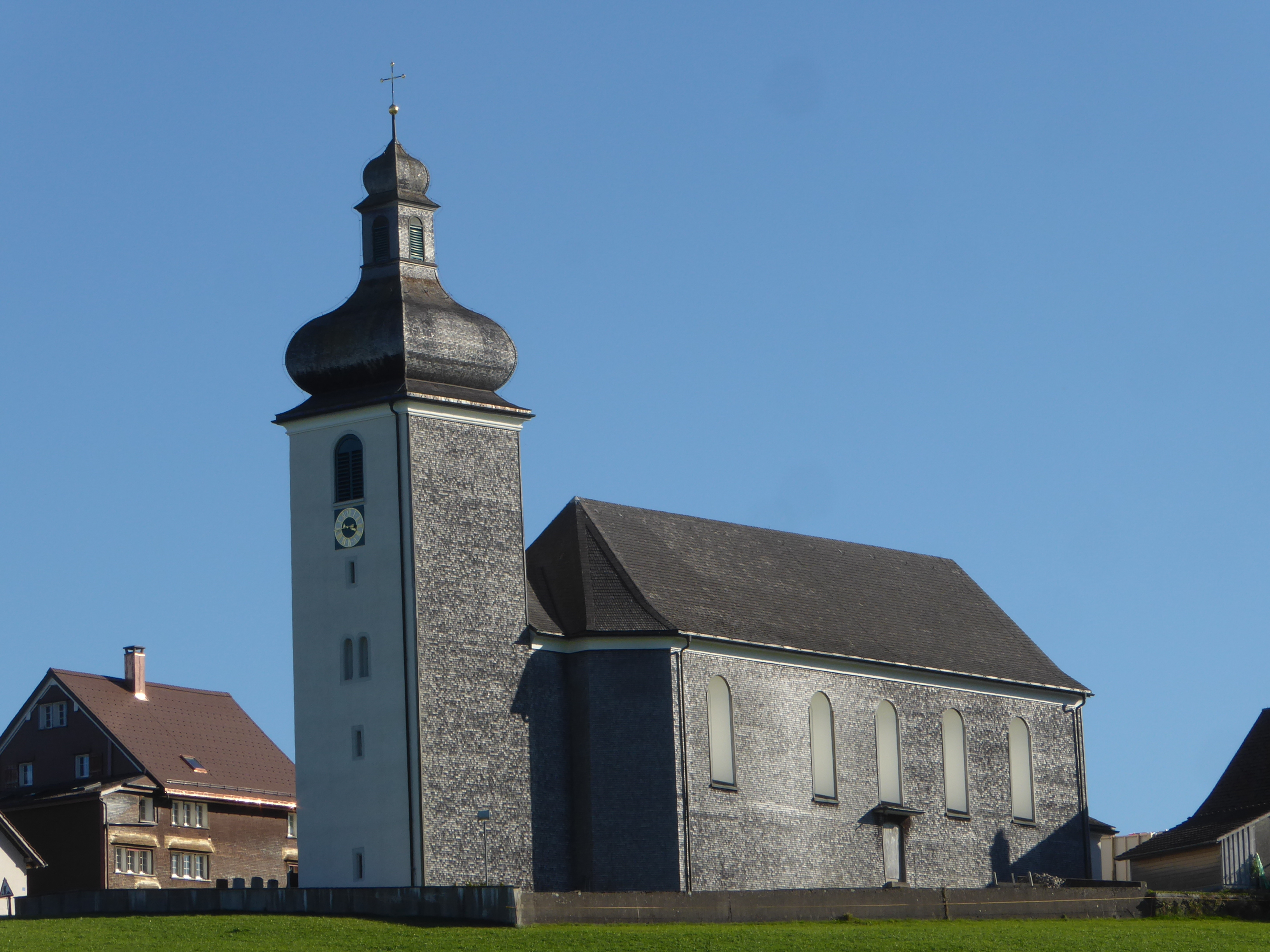 Katholische Kirche Hemberg mit geschindelter Fassade auf der Westseite{Cultural property of regional significance in Switzerland|8156